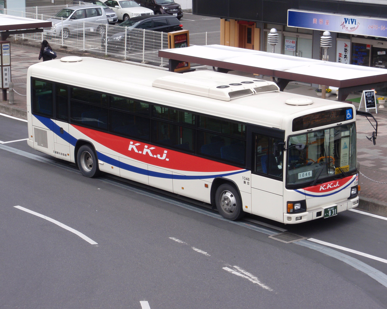 川越観光バス（1046／日野ブルーリボンII PDG-KV234Q2） 高坂駅にて Licensing